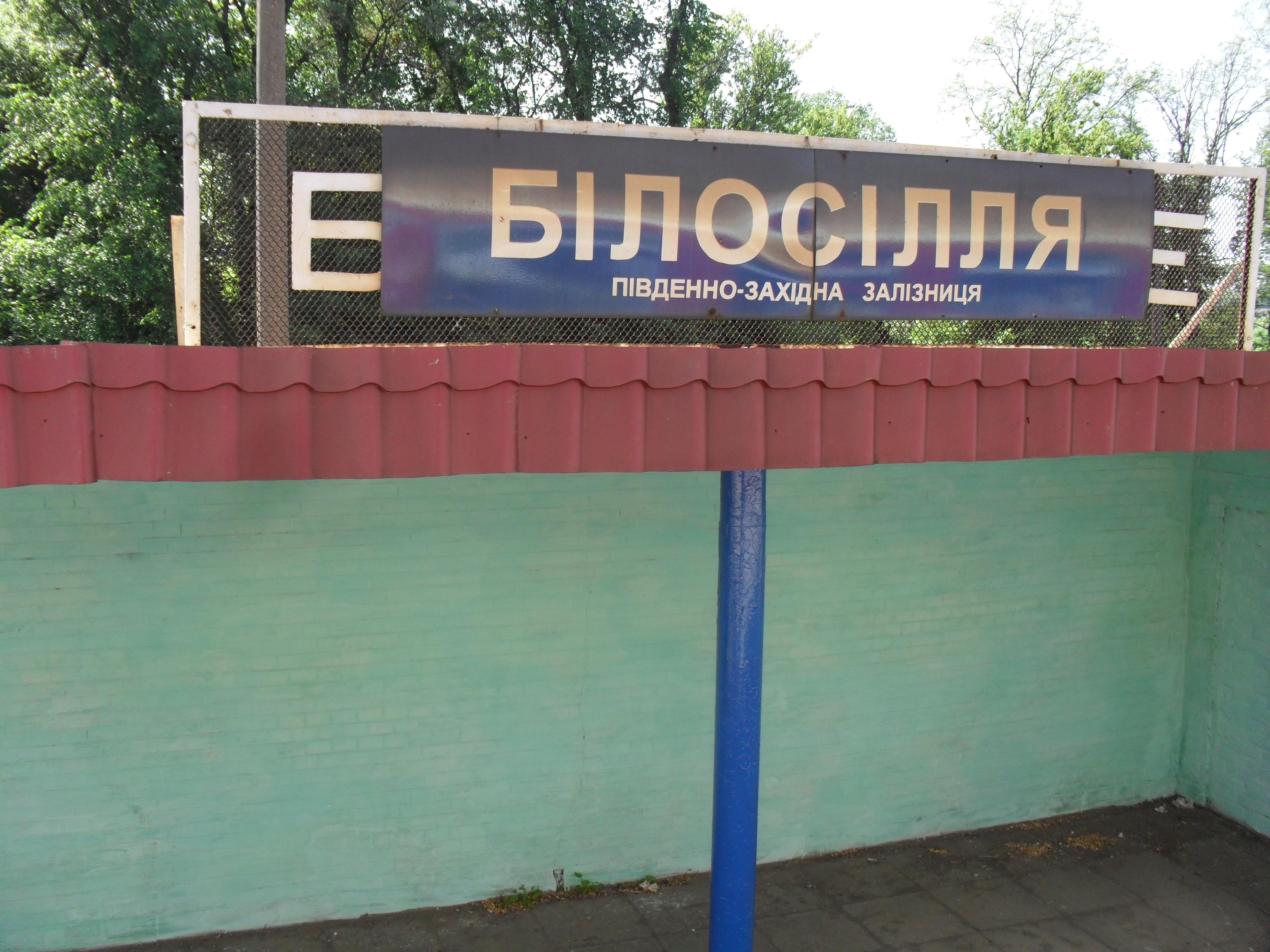 з.п. Білосілля